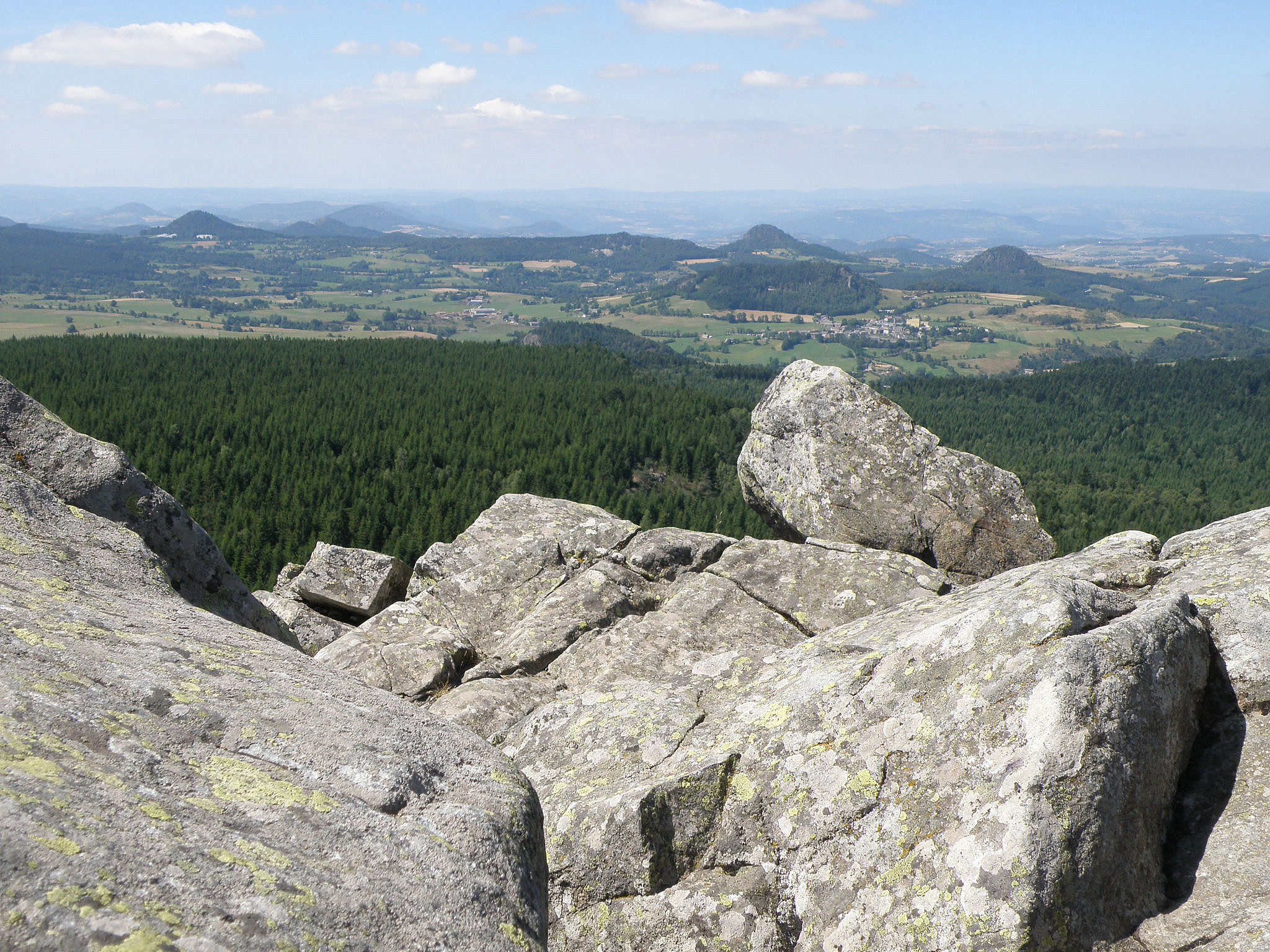 Araules, commune de la Haute-Loire, France, région Auvergne. Vue sur le village d'Araules depuis le pic du Lizieux (appelé aussi suc du Lizieux, alt. 1388 mètres), montagne pierreuse conique se dressant dans le sud-est de la commune d'Araules. Regard dirigé vers le nord-nord-ouest. On distingue au centre droit de la photo la localité d'Araules elle-même, située non loin et un peu à droite du morne aplati du Clarel, avec son rocher apparent sur son flanc droit (c.-à-d. oriental). Plus loin, les deux dômes des sucs yssingelais d'Achon (à droite, alt. 1151m) et des Ollières (à gauche, alt. 1186m), tous deux dans la comm. d'Yssingeaux. À gauche de ce dernier s'étire la masse oblongue du suc de Bellecombe, aux deux sommets (1178 et 1152m). Le suc à gauche sur la photo, au pied duquel se voient deux taches blanches (des serres en plastique), est, pensons-nous, le suc de Montaigu (alt. 1241m), également dans la (vaste) comm. d'Yssingeaux. À l'avant-plan : rocs au sommet du pic de Lizieux. Le petit mont que l'on remarque au centre, juste à la lisière de la forêt au second plan, est le suc du Besset (alt. 1109m, comm. d'Araules).